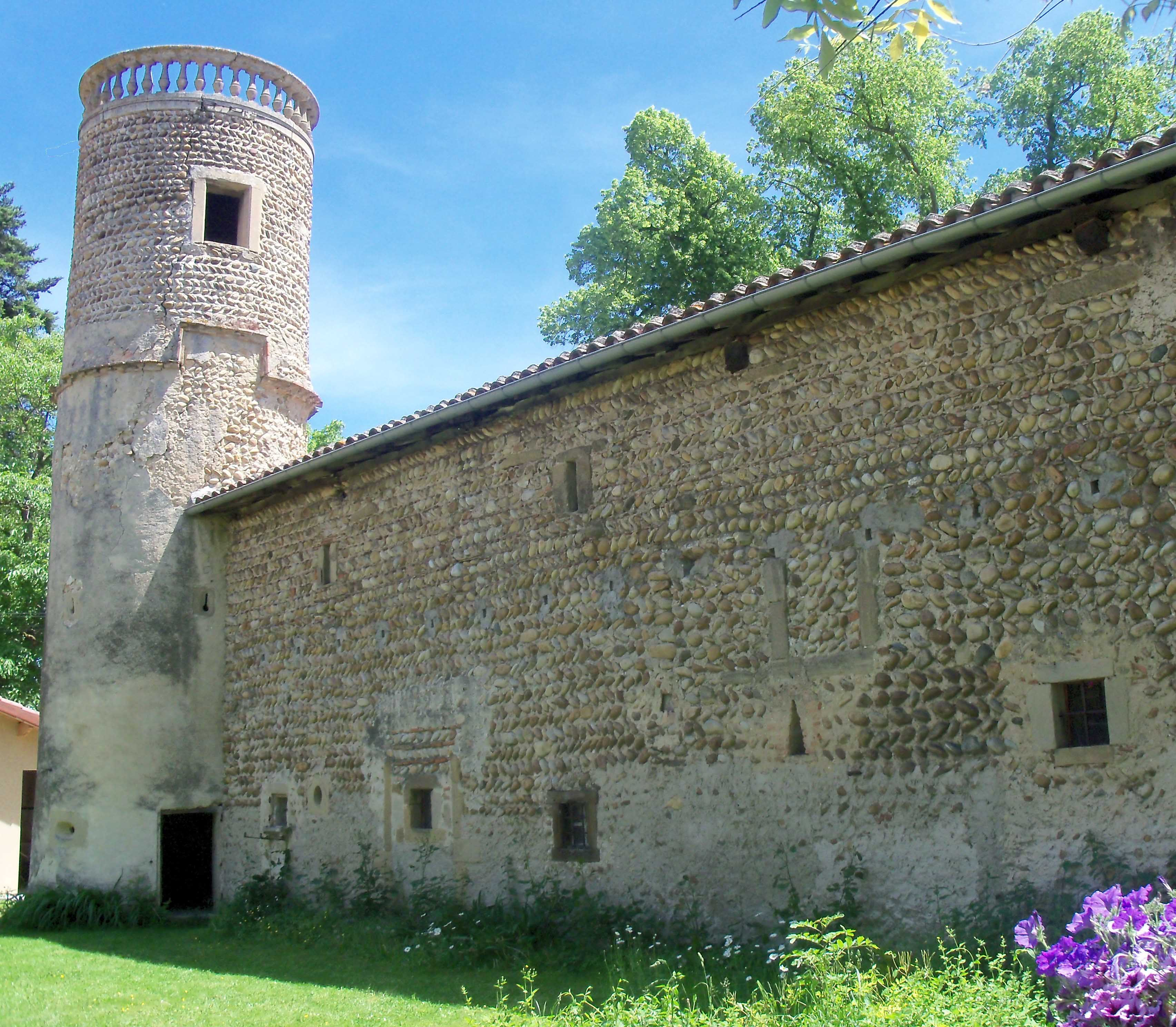 Château de Jarcieu - Musée de la faïence fine